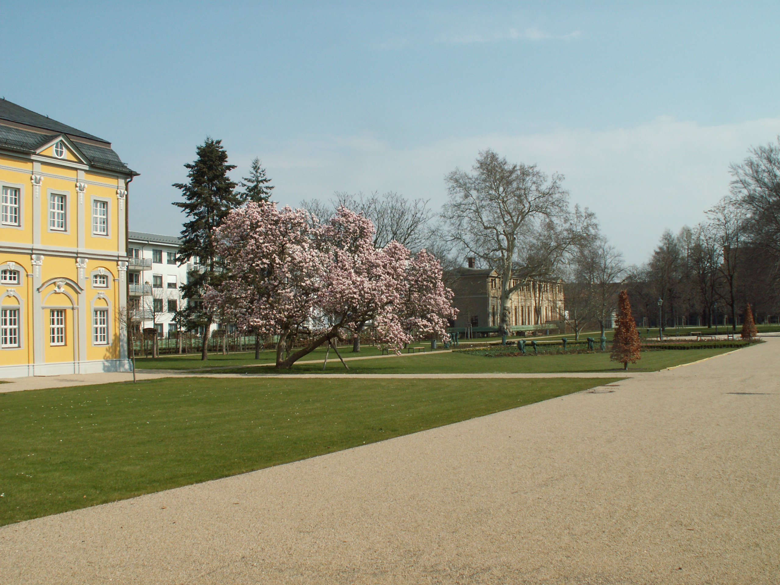 Aufgenommen auf einer Wanderung vom Hofwiesenpark in Gera zur neuen Landschaft Ronneburg. Hierbei handelt es sich um die beiden Teile des Bundesgartenschaugeländes, die mehr als 10 km voneinander entfernt liegen. Näheres zur Route findet sich auf der WebseiteWandern vom Hofwiesenpark Gera zur neuen Landschaft Ronneburg.